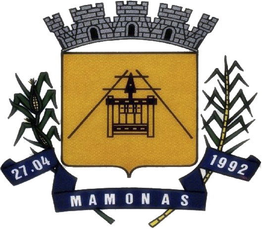 Bandeira de Mamonas MG